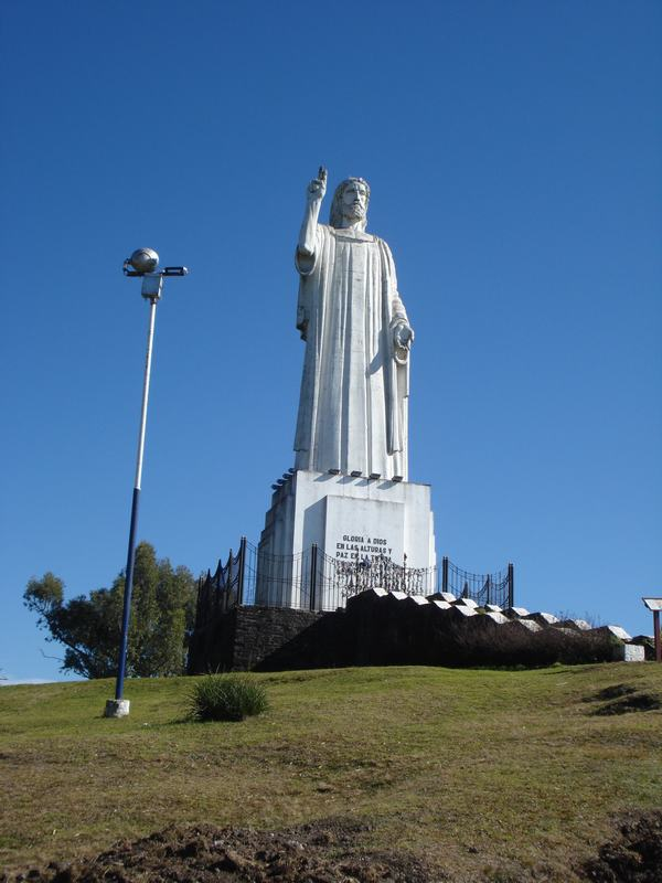 Cristo Redentor de Tucumán